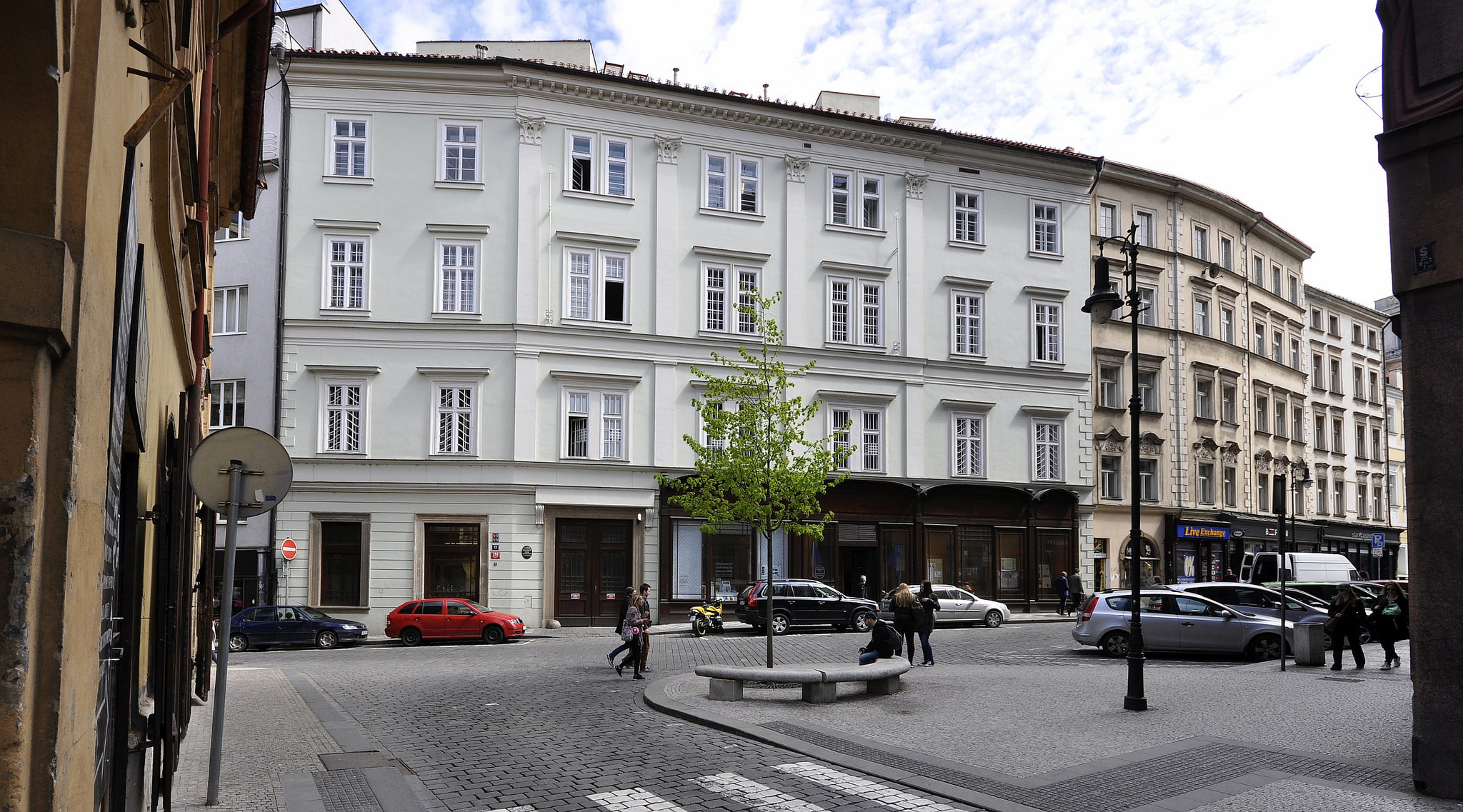 Purkrabský pivovar, Na Perštýně 356/12, Staré Město (Praha).